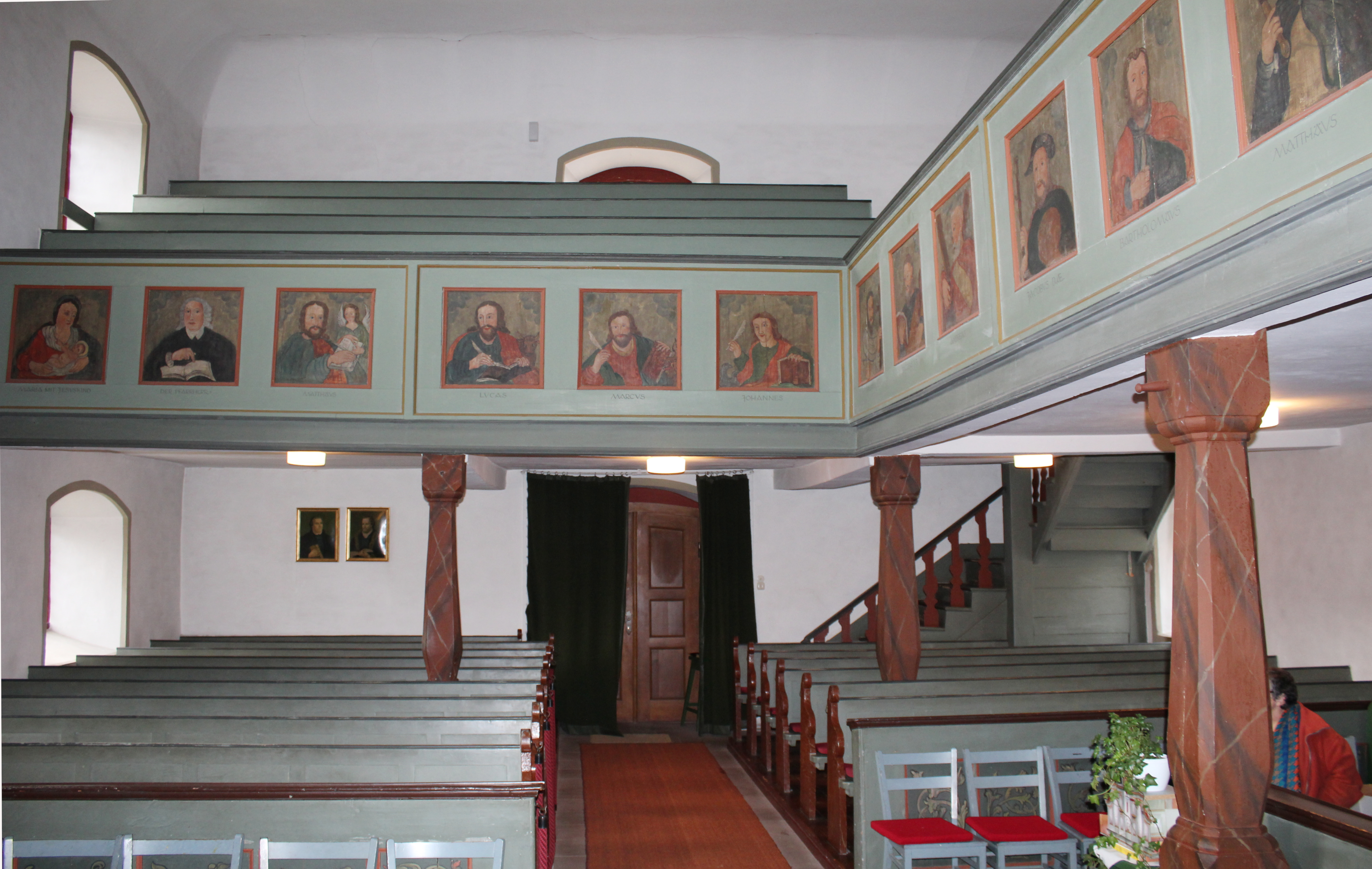 Evangelische Kirche Groß-Eichen, Gemeinde Mücke, Vogelsbergkreis, Hessen, Deutschland